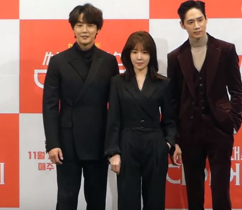 13일 오후 서울시 강남구 논현동 임피리얼 팰리스 서울에서 tvN 새 수목드라마 '싸이코패스 다이어리’ 제작발표회가 열려 배우 윤시윤, 정인선, 박성훈이 참석해 포토타임을 갖고 있다.